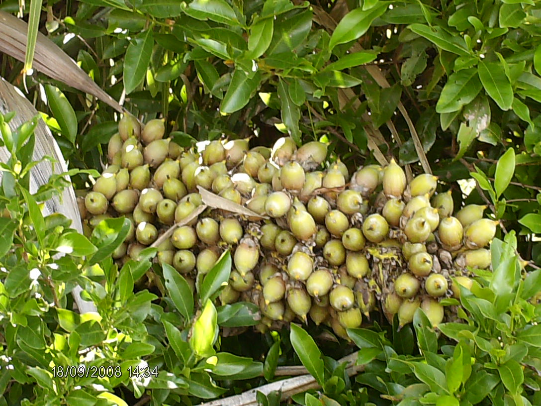 Coroba: Fruto de la Palma Coroba (Attalea macrolepsis). Caicara del Orinoco, Municipio Cedeño, Estado Bolívar, Venezuela.